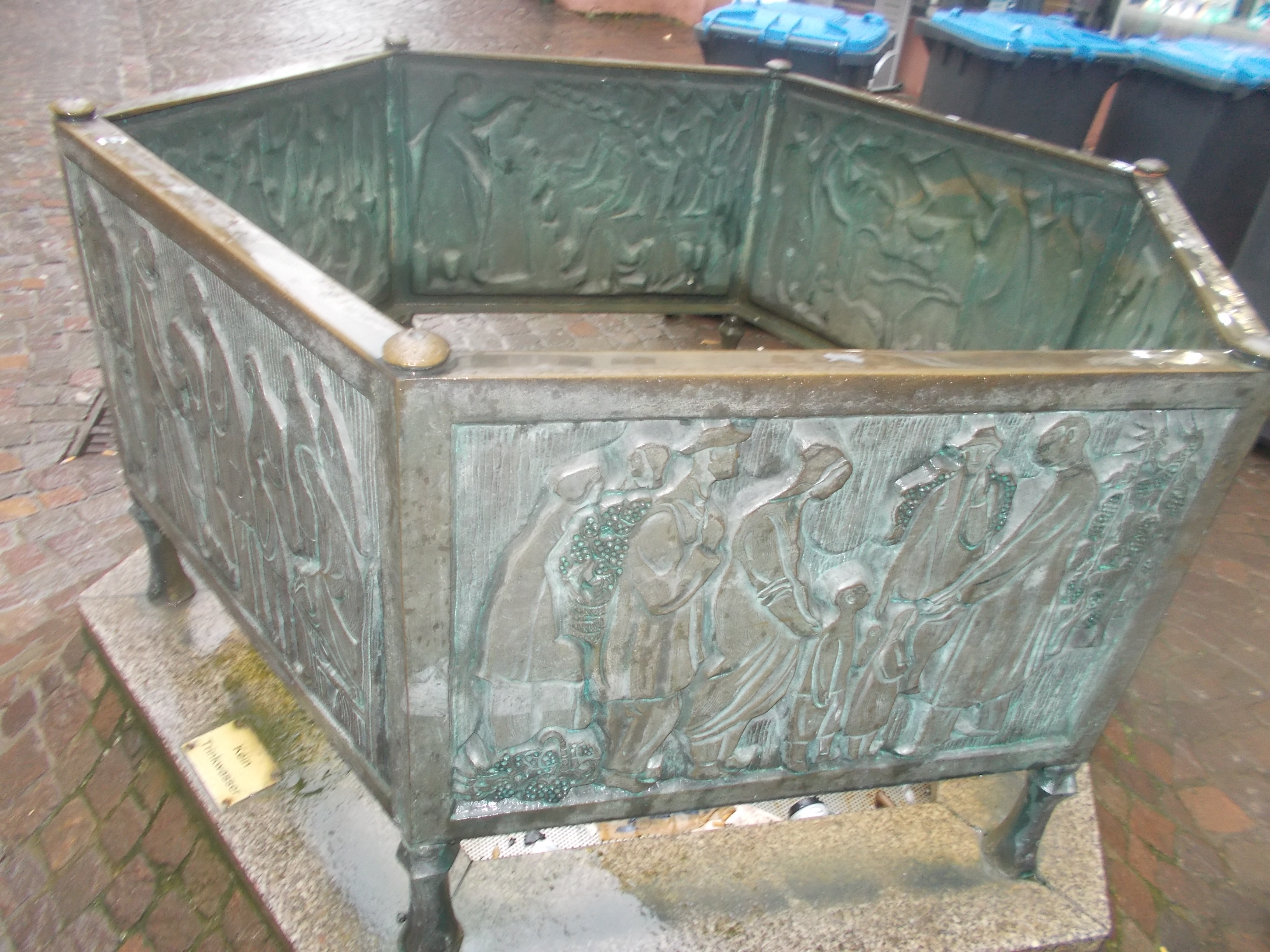 Dasbachbrunnen in der Glockenstraße in Trier